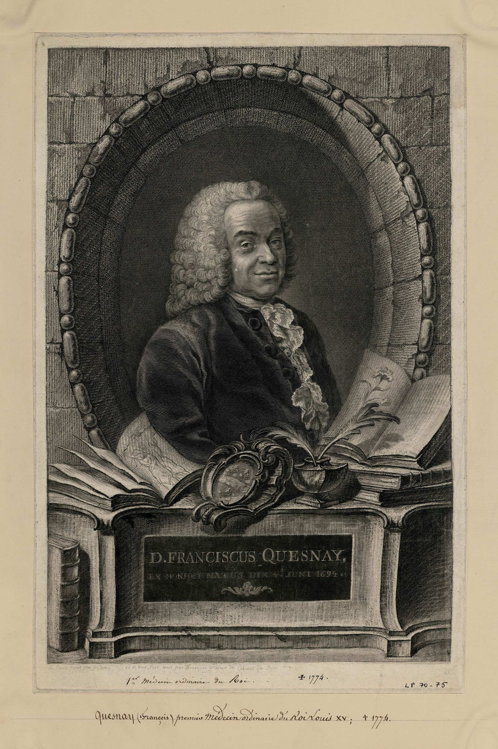 Portrait de François Quesnay réalisé par le graveur Jean-Charles François d'après une peinture de Jean-Martial Frédou.